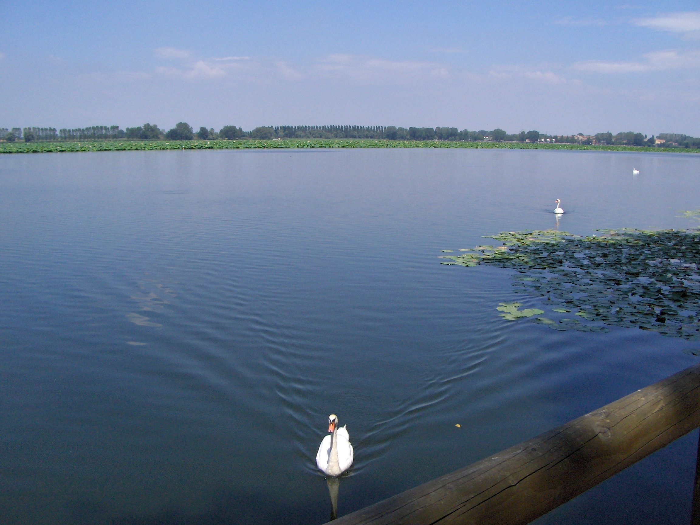 Mantova - Lago Superiore panorama